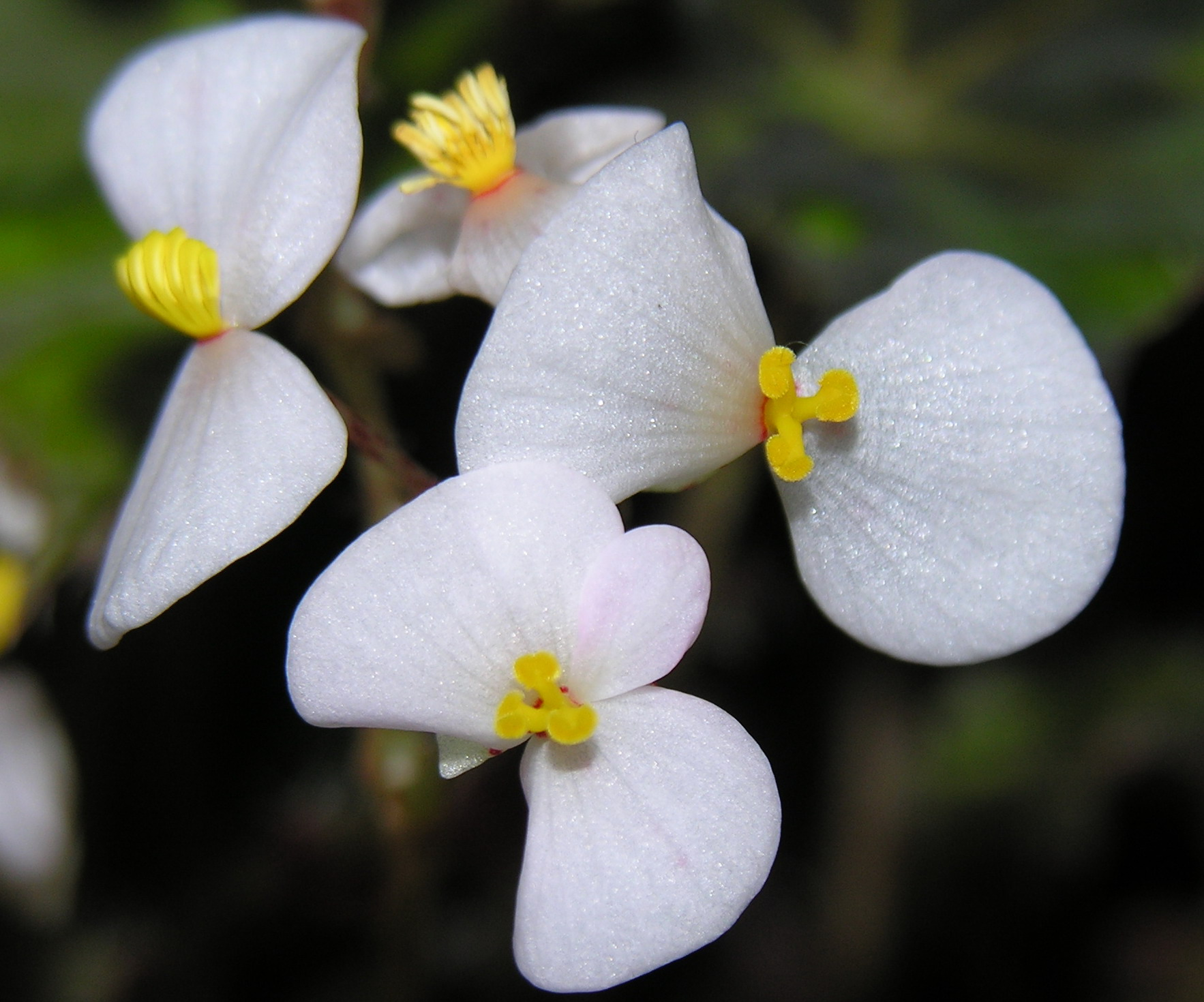 Boverio begonijos (Begonia boweri) žiedas Šeima. Begoniniai (Begoniaceae) Foto: Algirdas. Fotografuota darbo kabinete 2006 m. kovo 9 d.